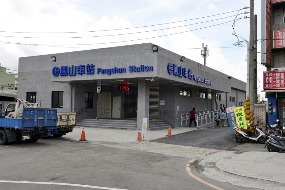 配合高雄市區鐵路地下化工程鳳山計畫，原先臺鐵鳳山站的站房與月台軌道區需要拆除改建，在原站的北側新建臨時月台與臨時軌，並於先前臺糖鳳山站原址興建臨時站房，於2014年6月22日啟用。